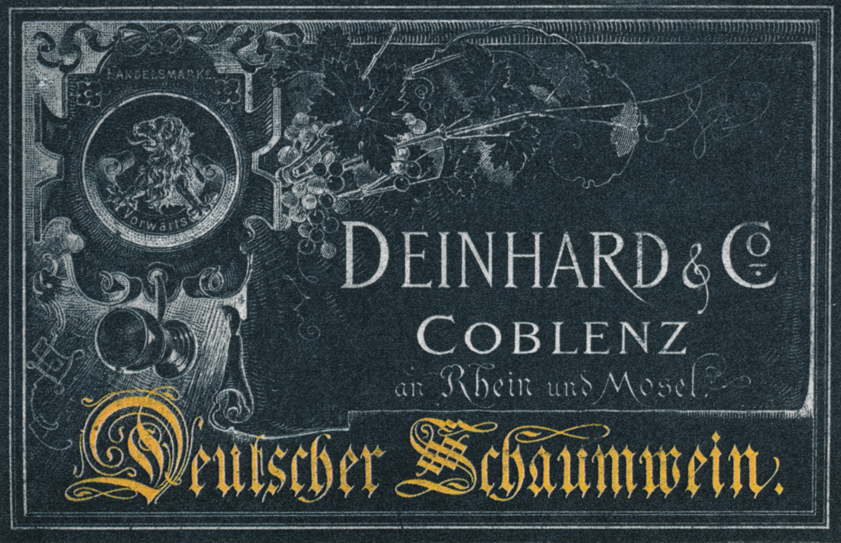 Deinhard-Etikett aus dem späten 19. Jhd., reproduziert in "Deinhard. Erbe und Auftrag", 1969